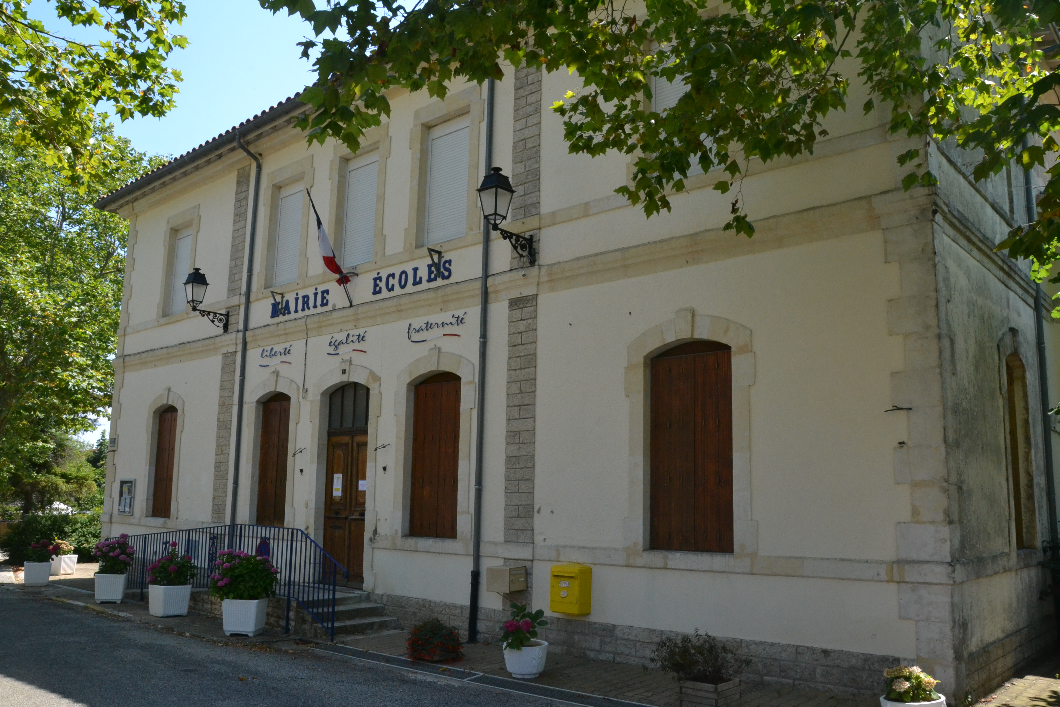 Mairie-école de Nébias (Aude, France).